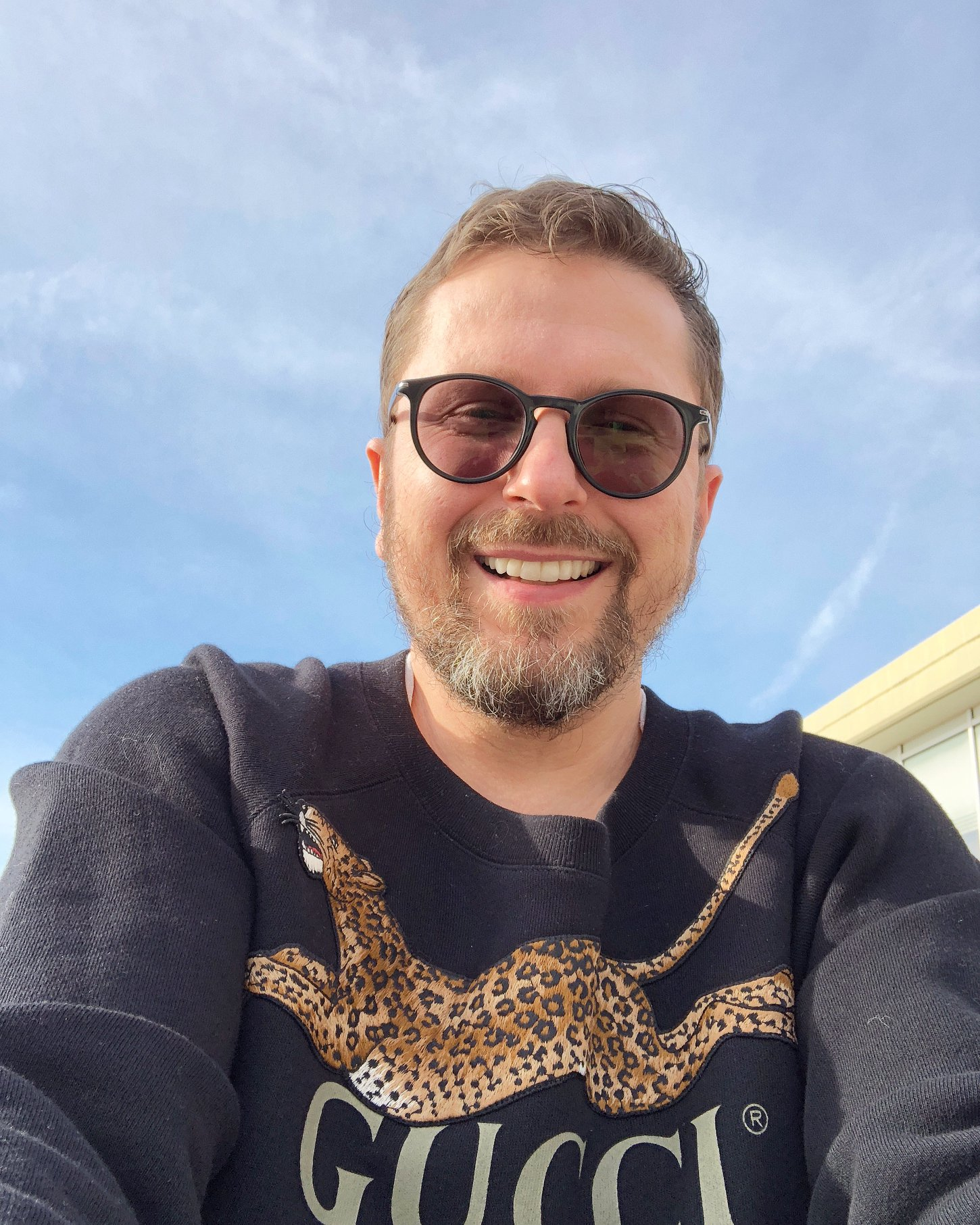 Анатолий Шарий, медиа-эксперт